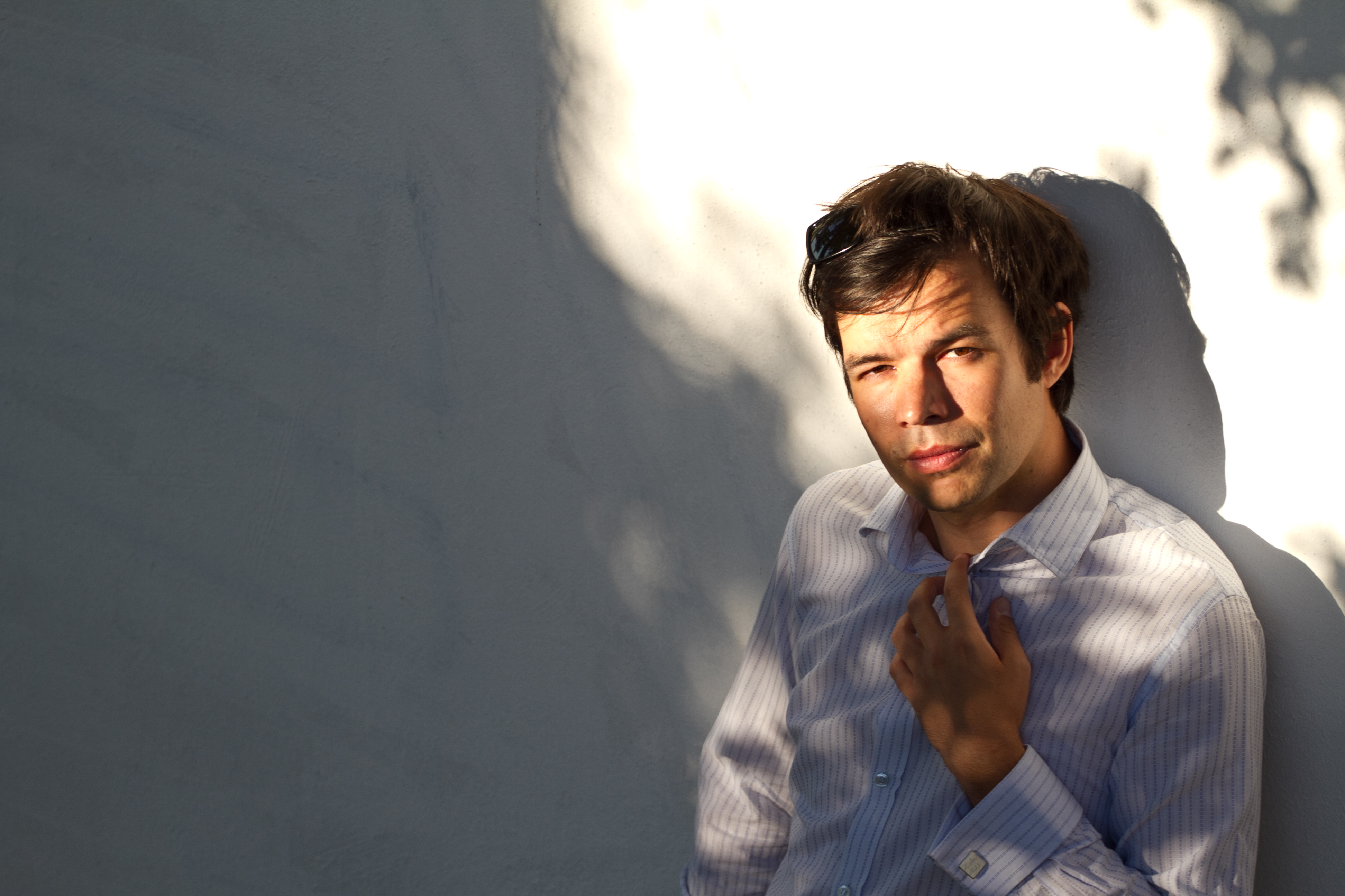 Spisovatel Jan Němec